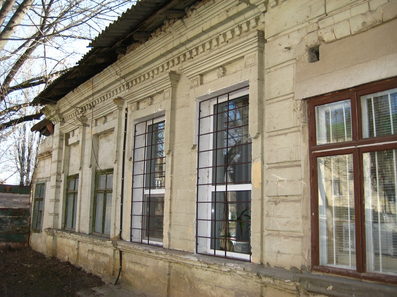 Здание бывшего еврейского медпункта